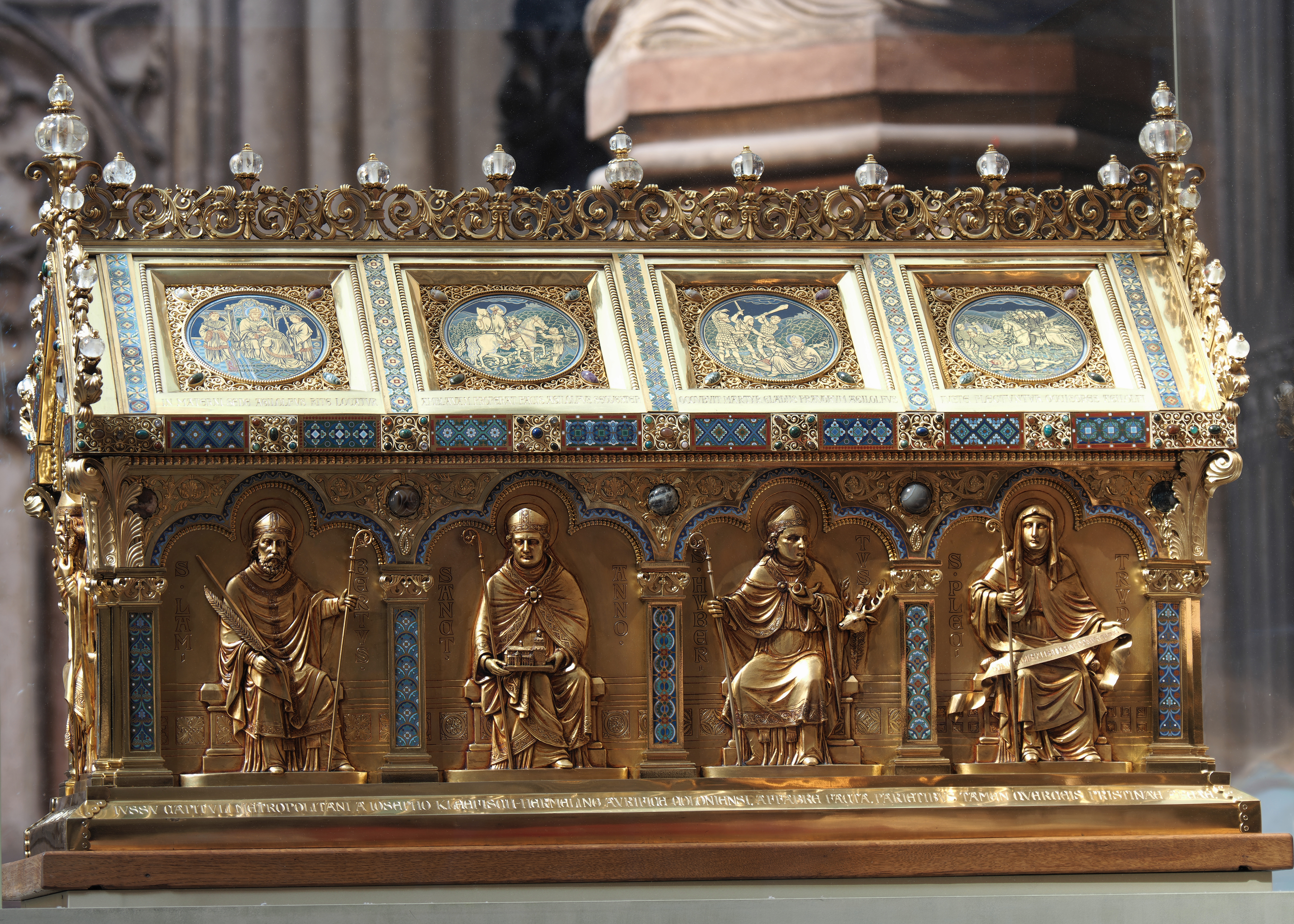 Kölner Dom, Schrein für die Reliquien des Agilolphus.